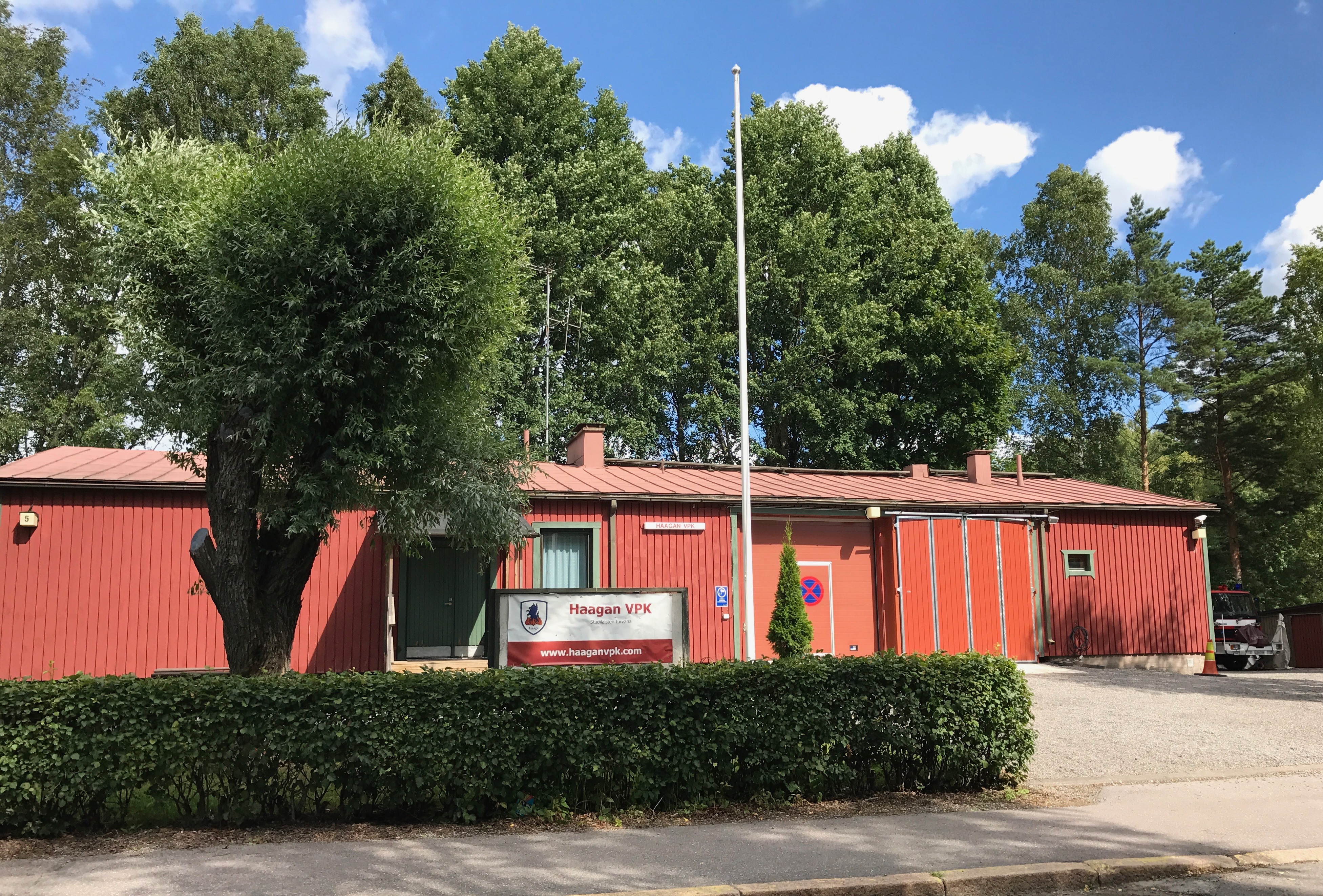 Haagan VPK:n asema Helsingissä.